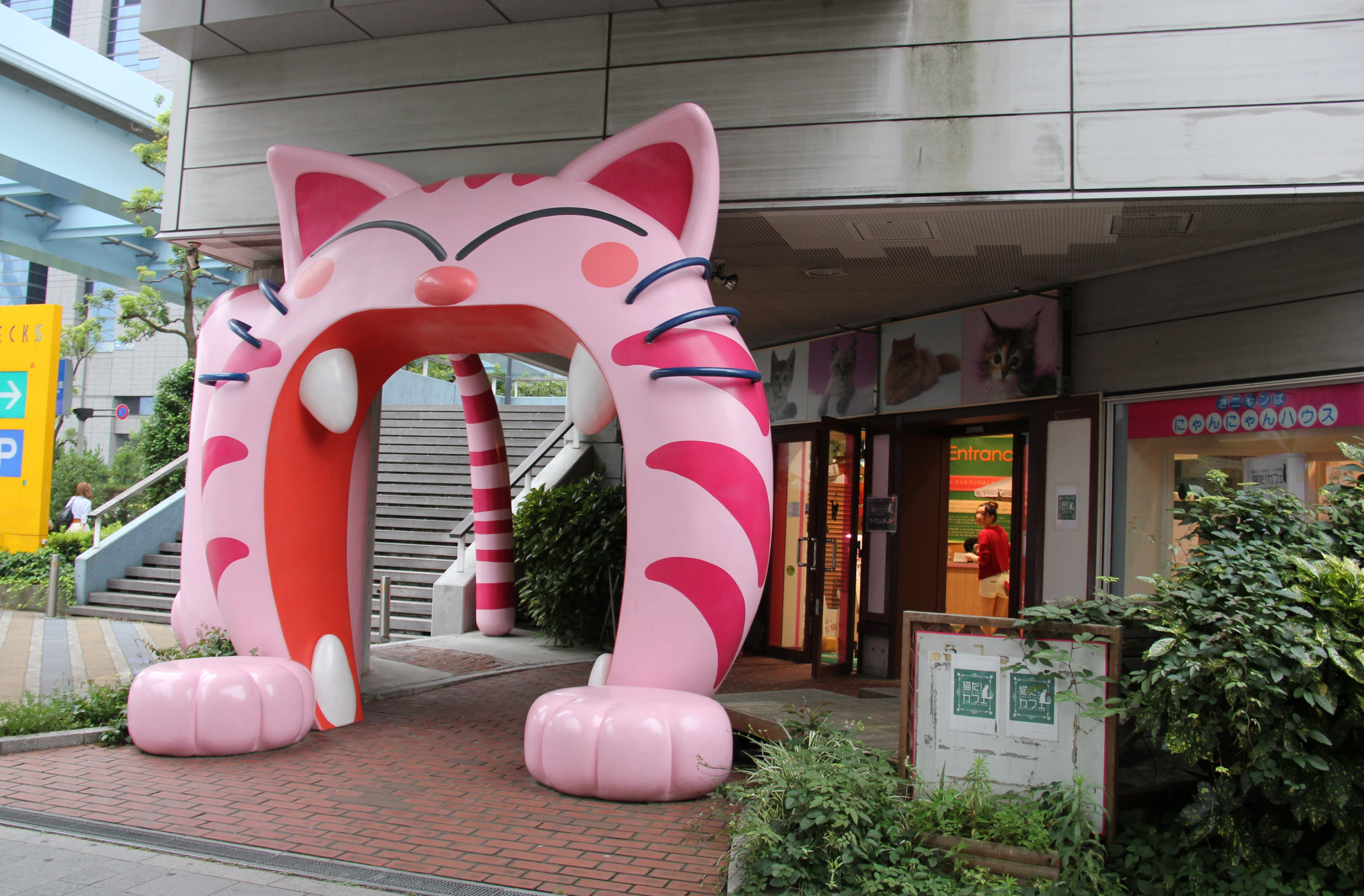 Cat Cafe